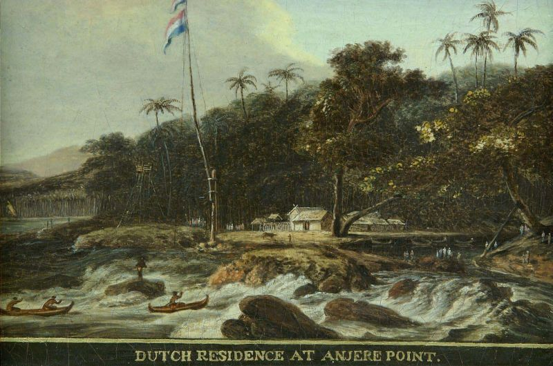 Olieverfschilderij. De plaats Anjer, aan de bocht van Anjer had vroeger zijn betekenis te danken aan de gunstige ligging aan het nauwste gedeelte van de Straat Sunda, waardoor alle uit Europa komende schepen, zowel die bestemd voor Indonesië als China, Japan en Manilla, die plaats aandeden om zich te rapporteren of om orders op te nemen en zich van verversingen en drinkwater te voorzien. Hiervoor was een 4,5 km lange waterleiding aangelegd.. Een Nederlandse post aan de bocht van Anjer op Java